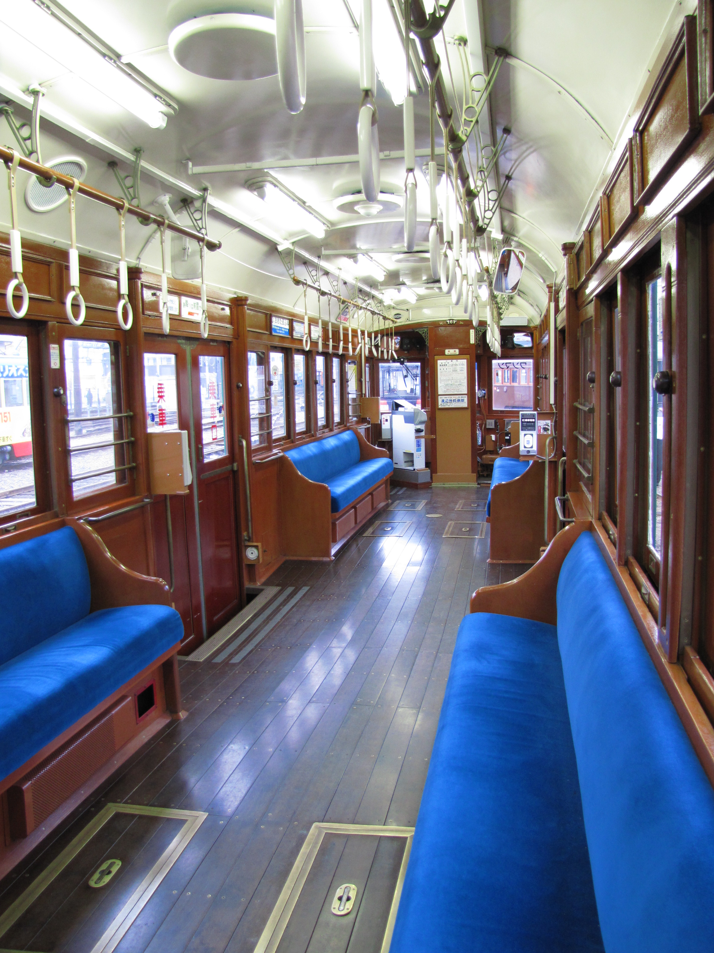 昭和40年代の内装に復元された１６１号の車内